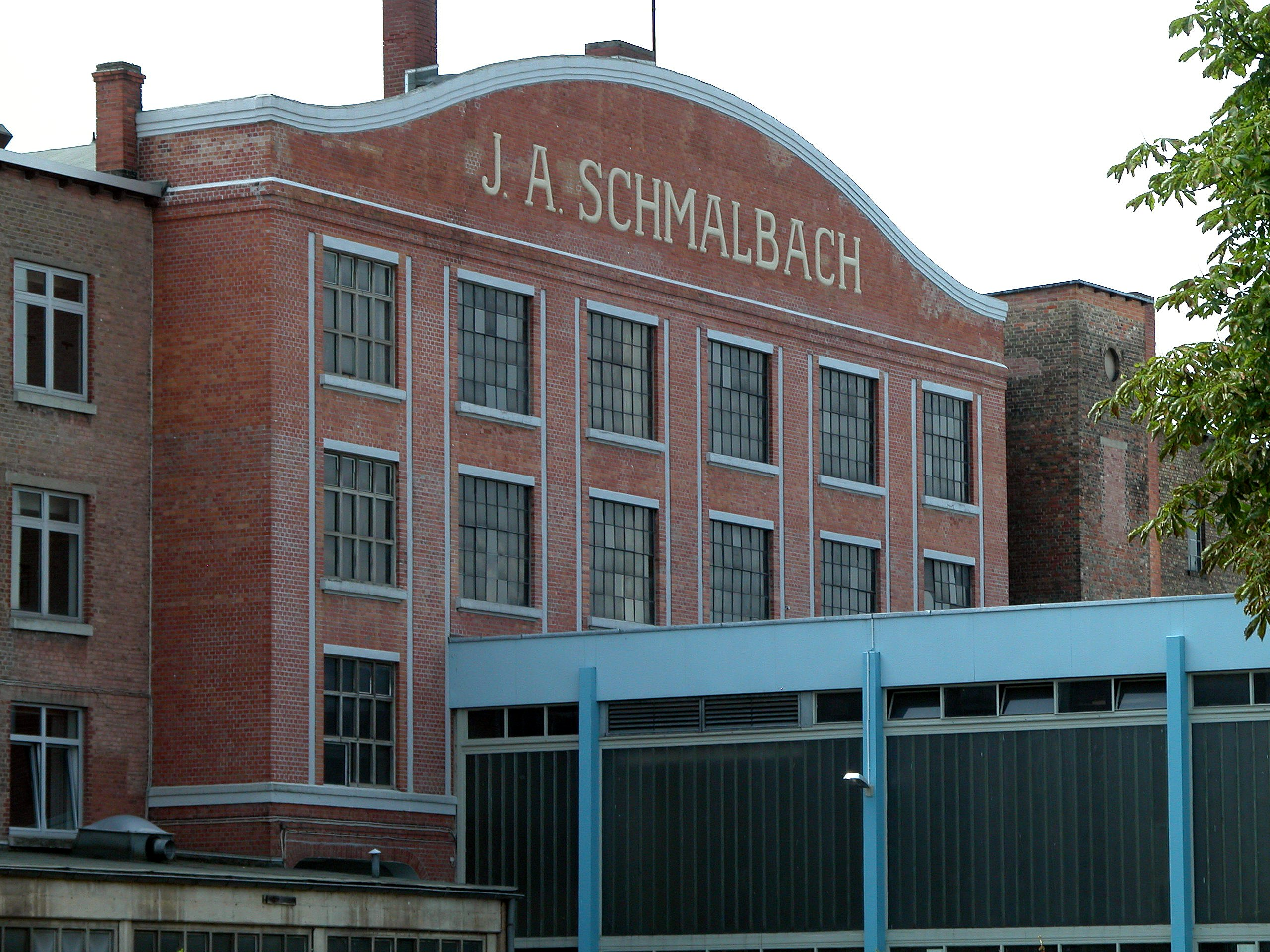 Braunschweig: Altes Werksgebäude J. A. Schmalbach. Braunschweig, Germany: Old Schmalbach Factory building.